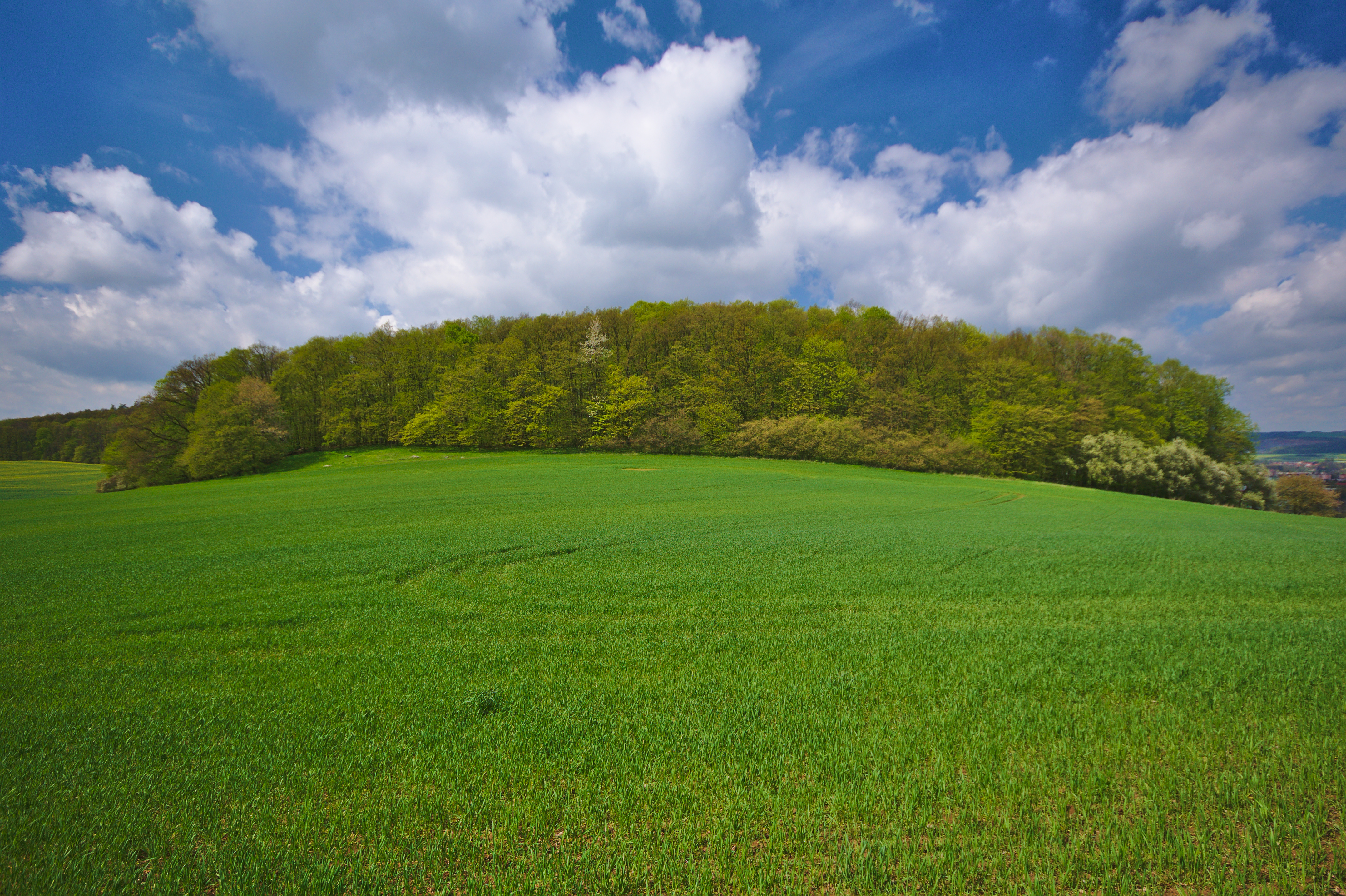 Přírodní rezervace Velká Kobylanka, okres Přerov